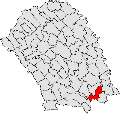 Categorie:Hărţi ale judeţului Botoşani